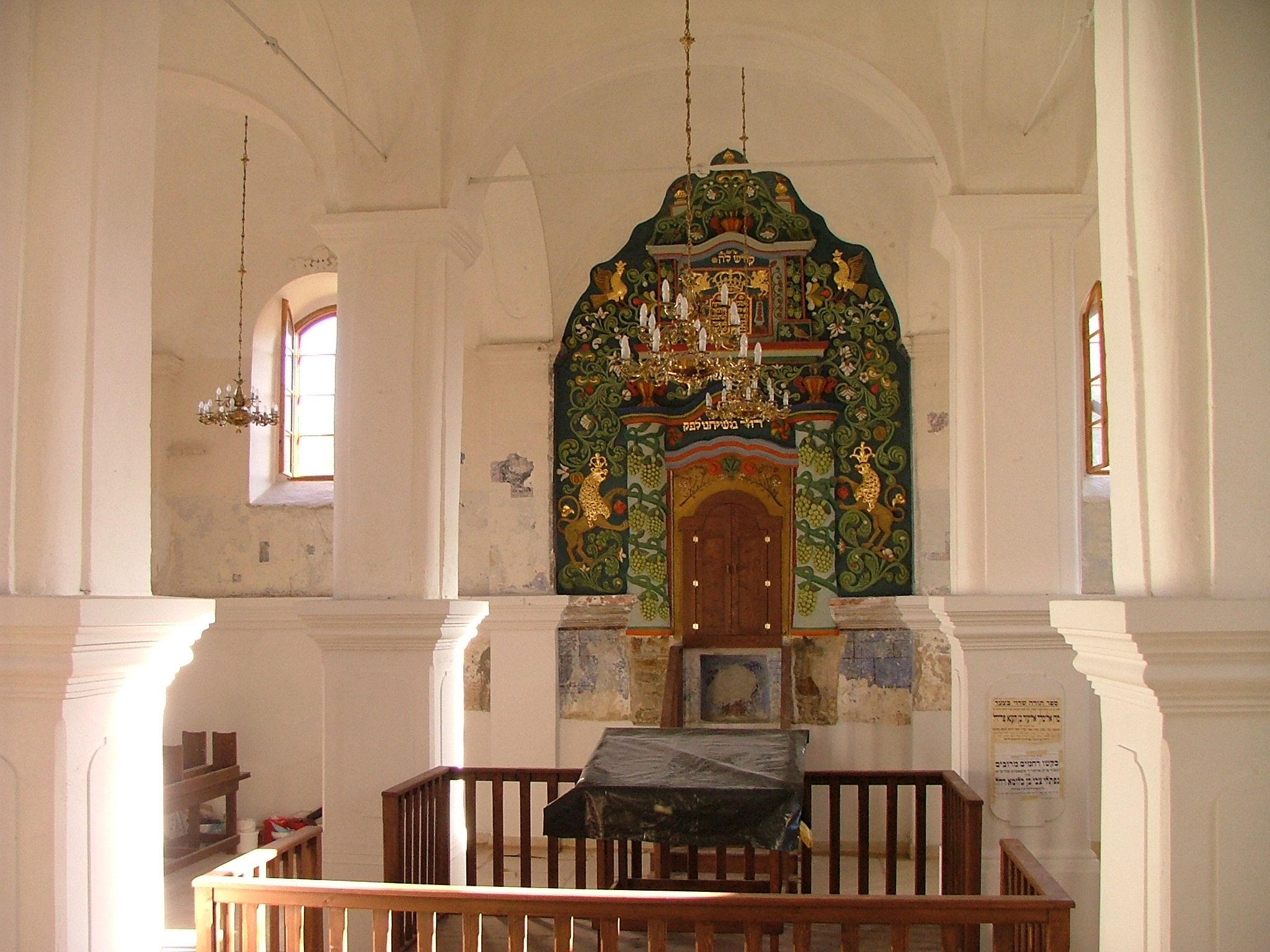 Synagogue of Bobowa, Poland